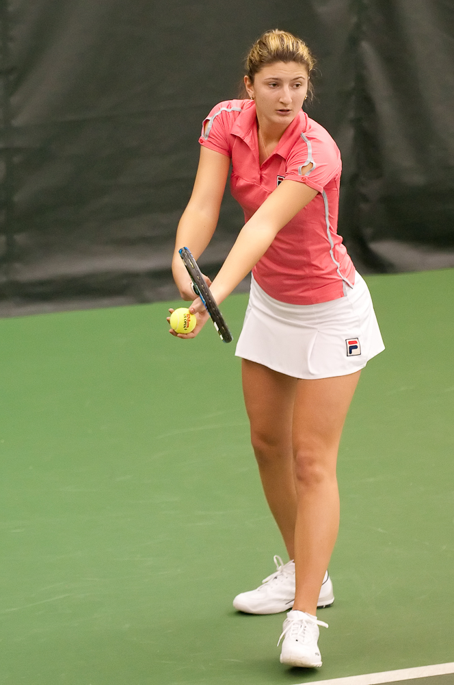 USTA Pro Tennis 2009 Midland Michigan